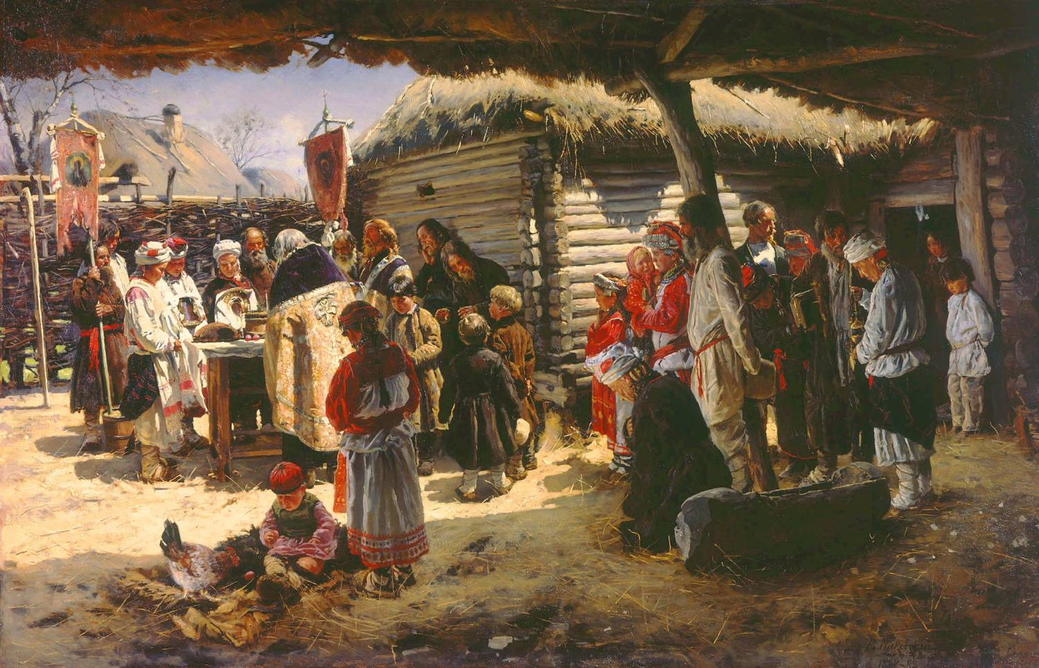 Владимир Егорович Маковский «Молебен на Пасху» или «Молебен на Святой неделе» 1887-1888